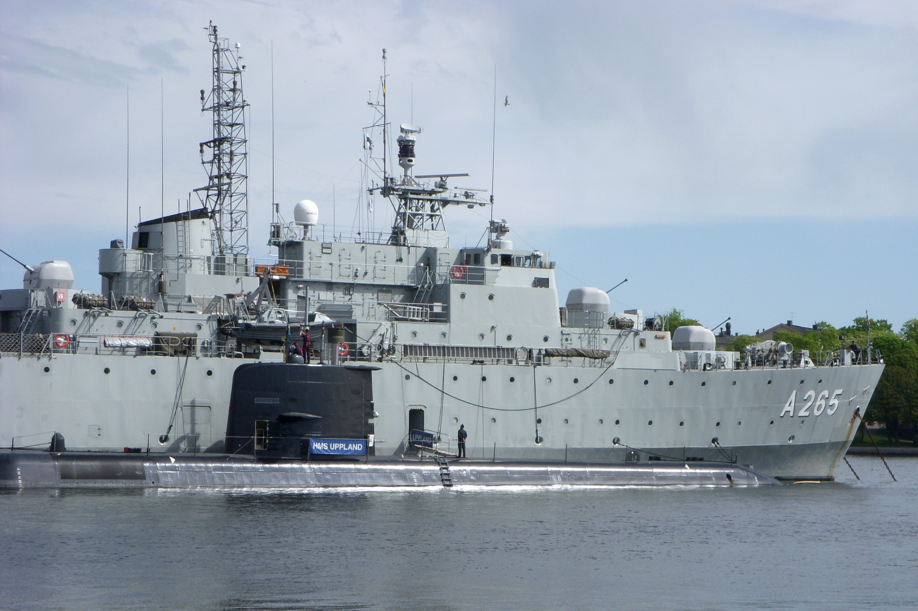 Ubåt HMS Uppland (Upd) med HMS Visborg (A265) vid Skeppsbron i Stockholm.